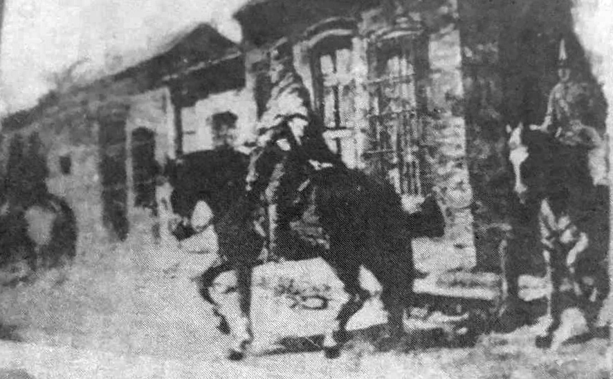 Cuadro del Dr Francia.